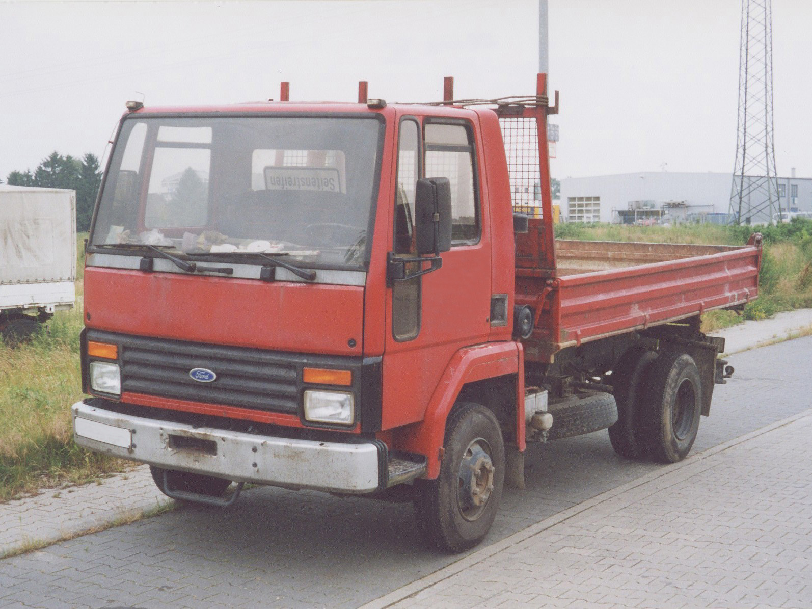 Ford Cargo LKW als Pritschenkipper